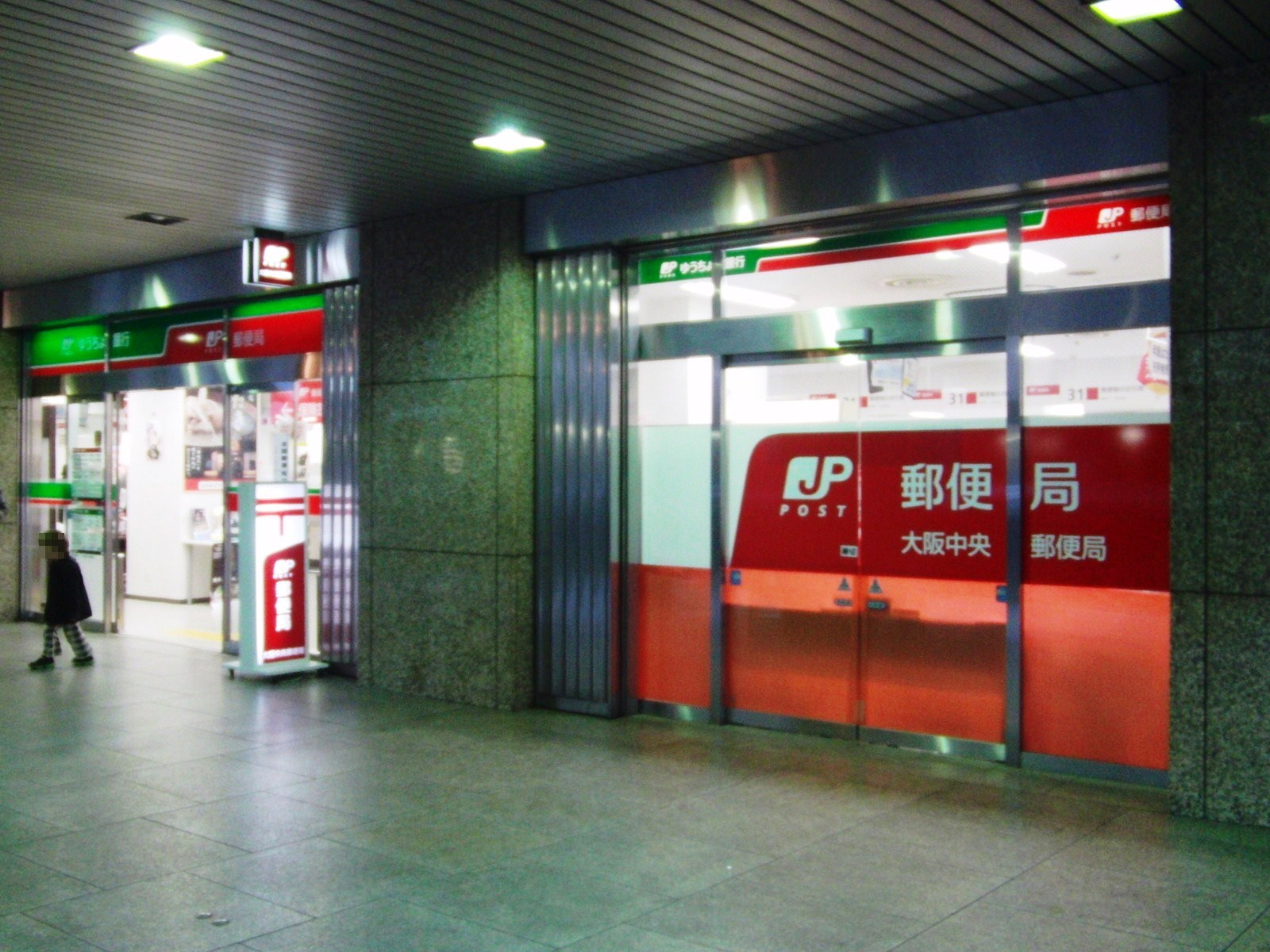 大阪中央郵便局及びゆうちょ銀行大阪支店の出入り口を撮影。